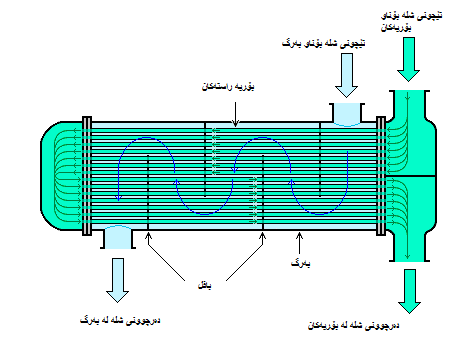 کوردی: نموونەیەکی گەرمی گۆڕ لە جۆری بەرگ و بۆری